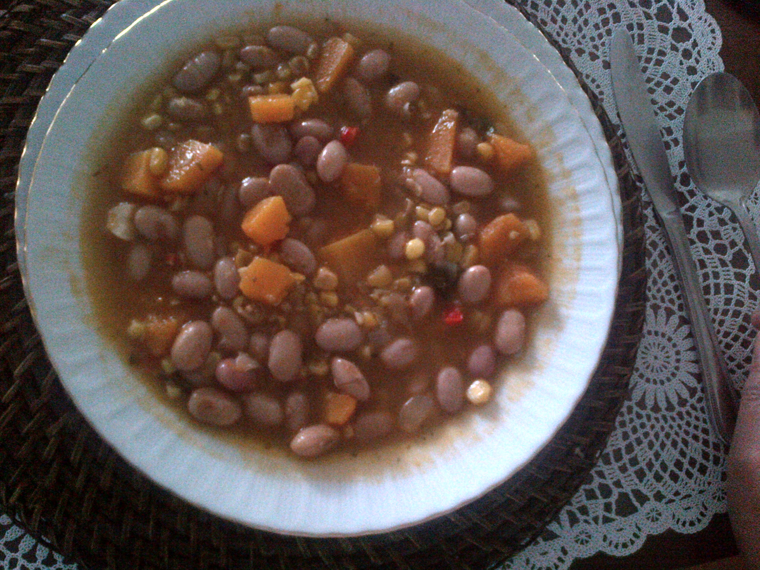 "Porotos granados con pilco", una comida chilena de judías nuevas.